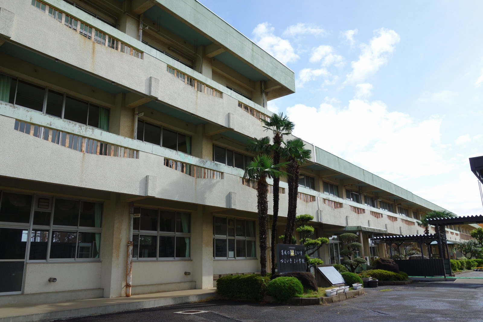 つくば市葛城小学校